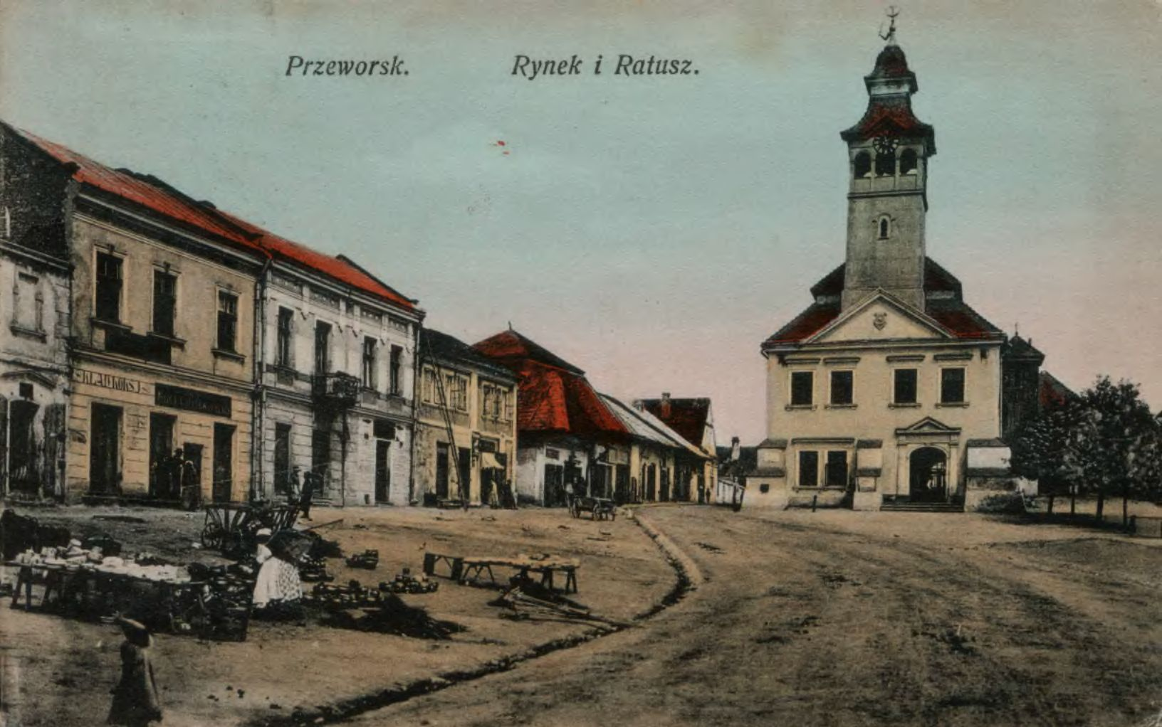 Rynek w Przeworsku w 1915